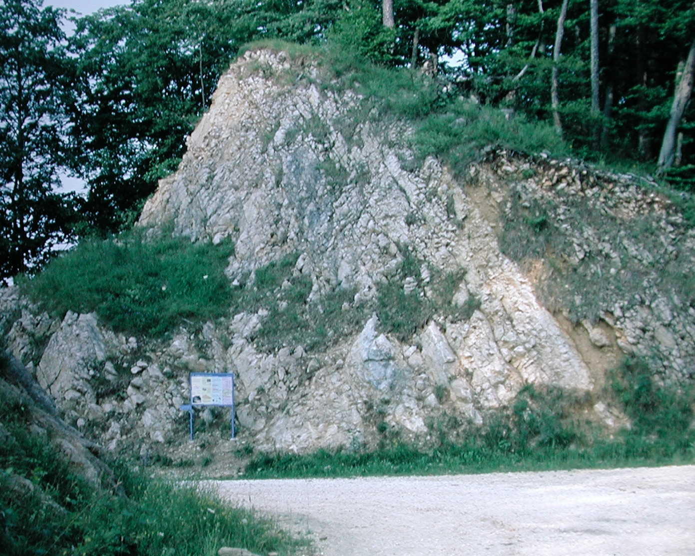 Aufschluss Fringeli mit Tafel der Geologischen Wanderung Bärschwil